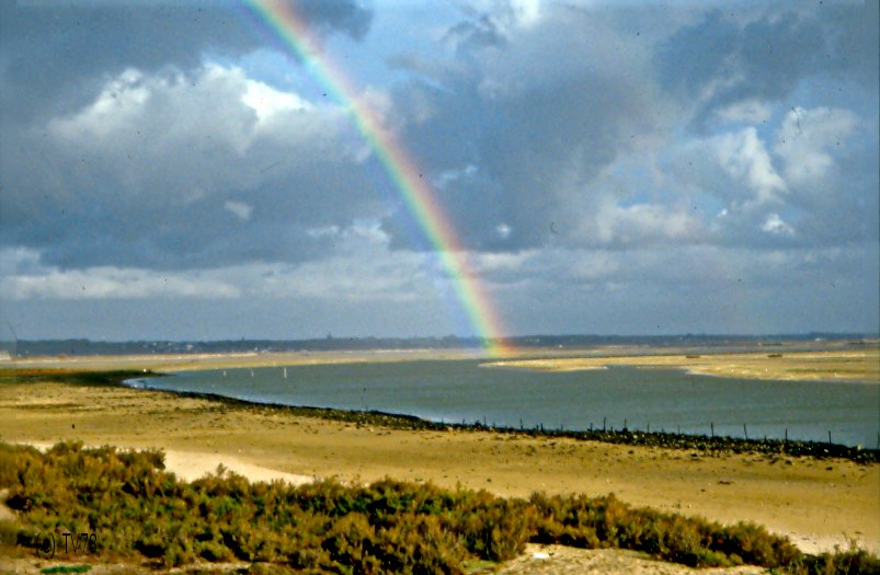 Marais salant Guérande Le-Croisic